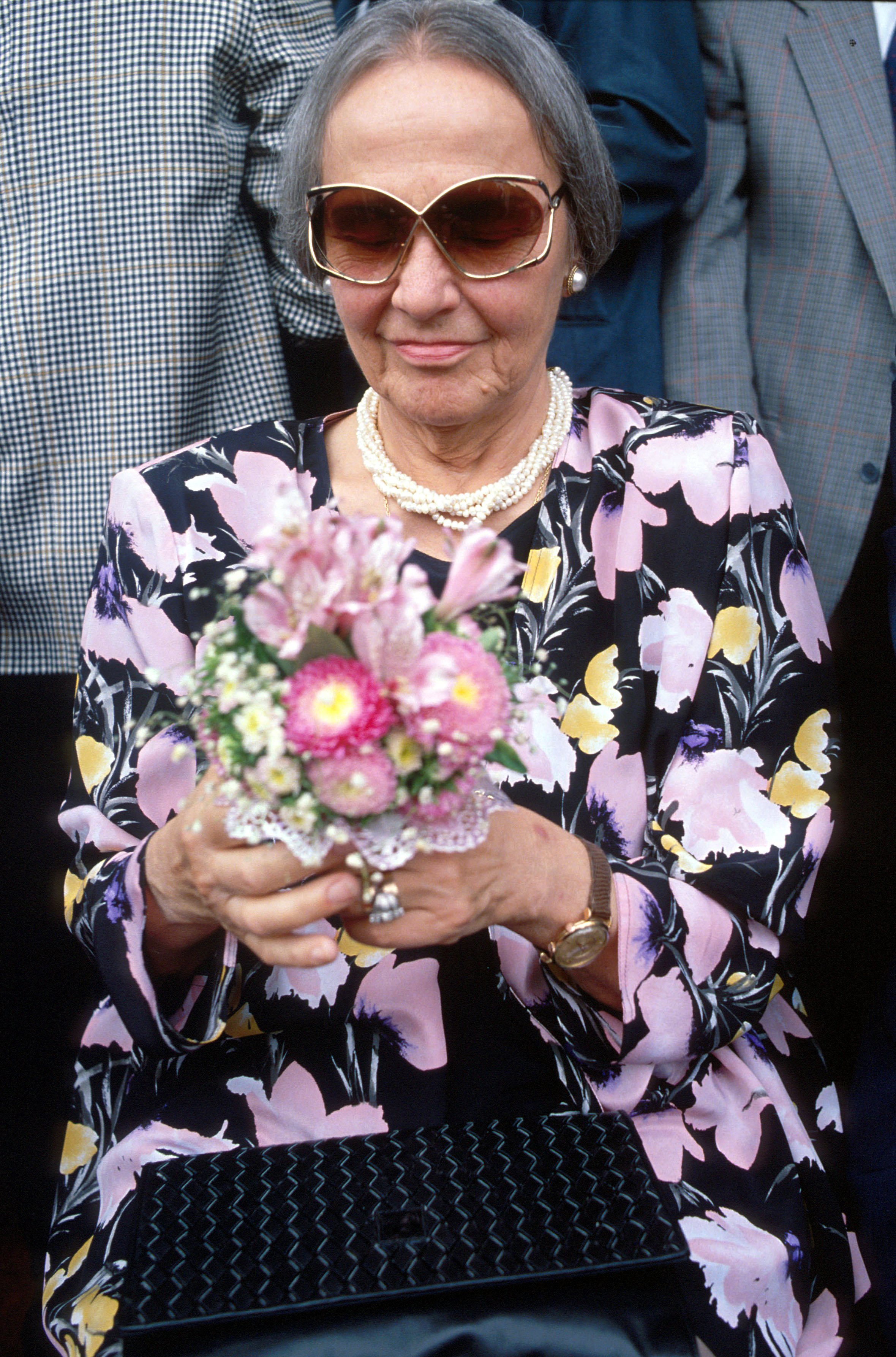 Nilde Jotti